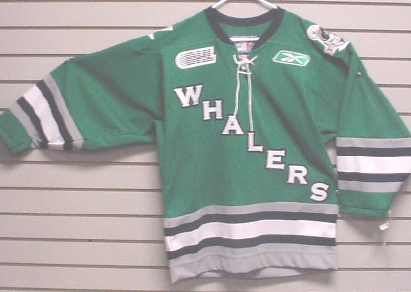 self taken photo